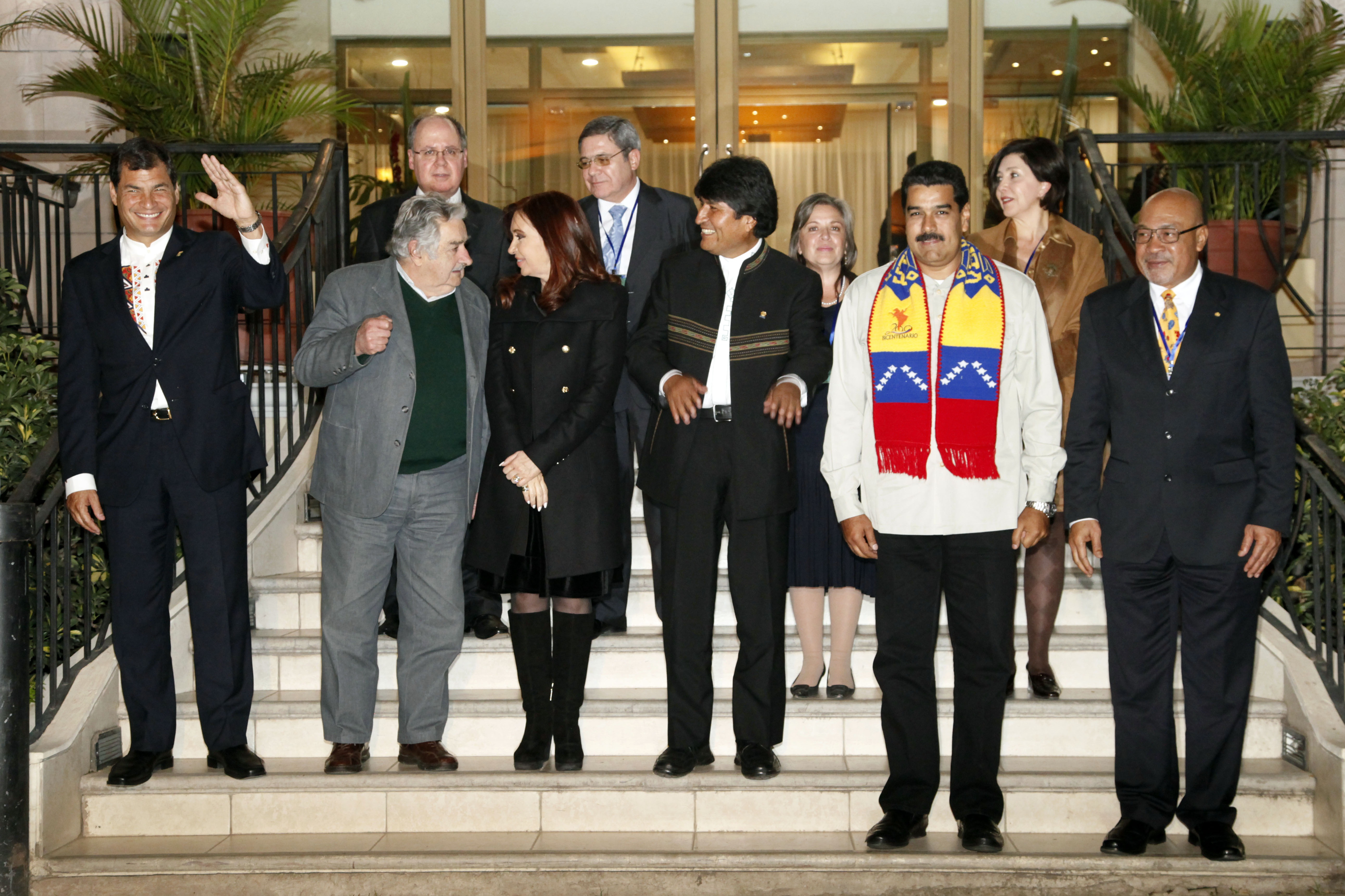 Cochabamba (Bolivia), 4 de julio 2013. Las Jefas y Jefes de Estado y de Gobierno de los países de la Unión de Naciones Suramericanas (UNASUR) ante la grave situación a la que fue sometida el Presidente de Bolivia por parte de Francia, Portugal, Italia y España, suscribieron este jueves 4 de julio la Declaración de Cochabamba la cual establece que la inaceptable restricción a la libertad del Presidente Evo Morales. Foto: Fernanda LeMarie - Cancillería del Ecuador.